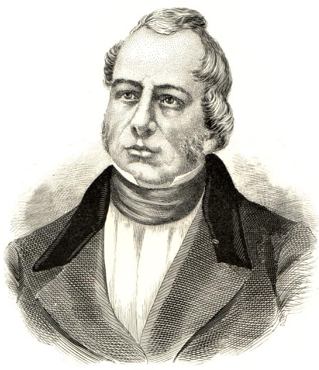 Joseph Masson (1791-1847), canadian businessman and politician, homme d'affaires et homme politique canadien